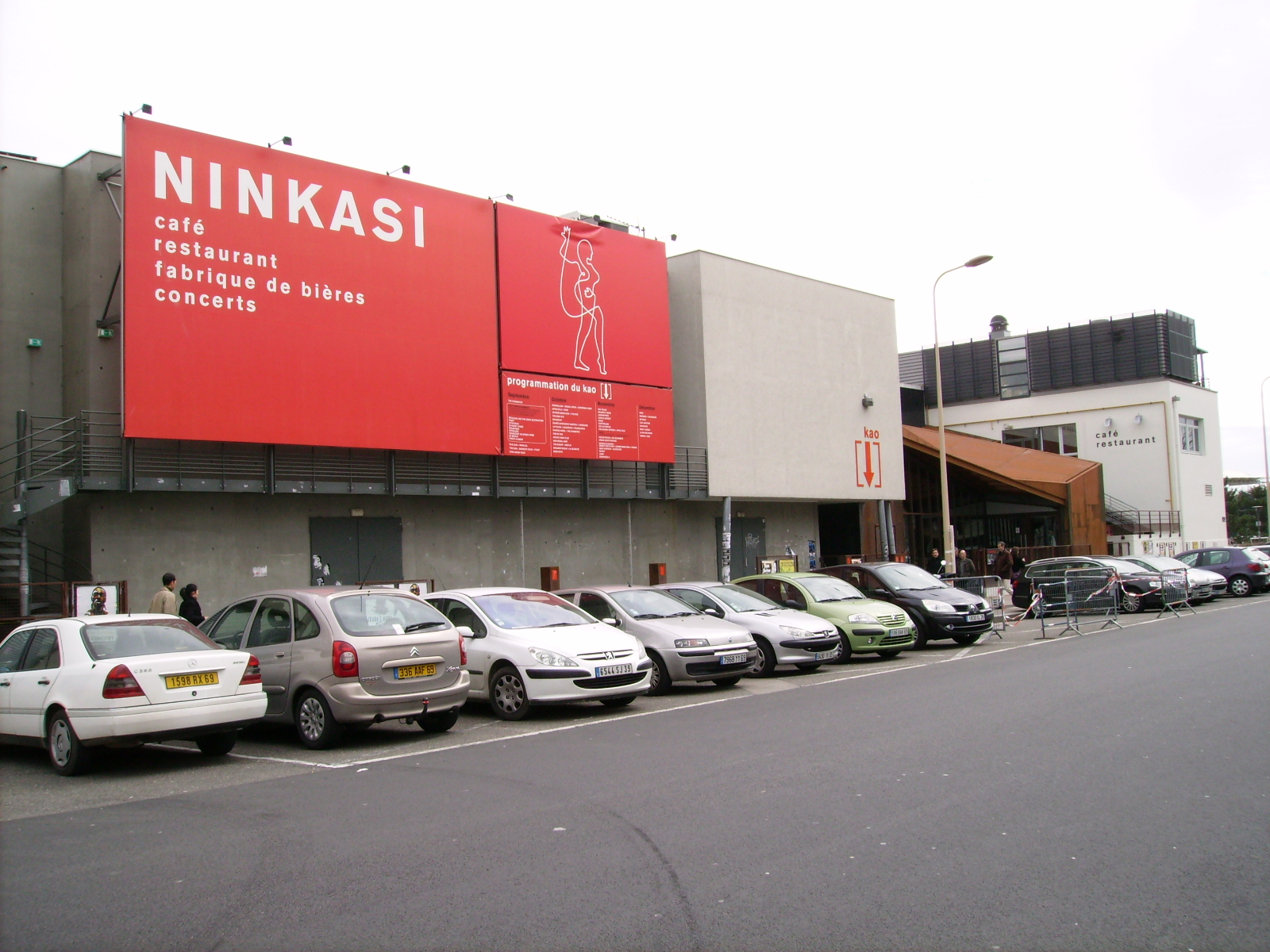 Ninkasi Kao à Gerland, Lyon 7 (Rhône, Rhône-Alpes).